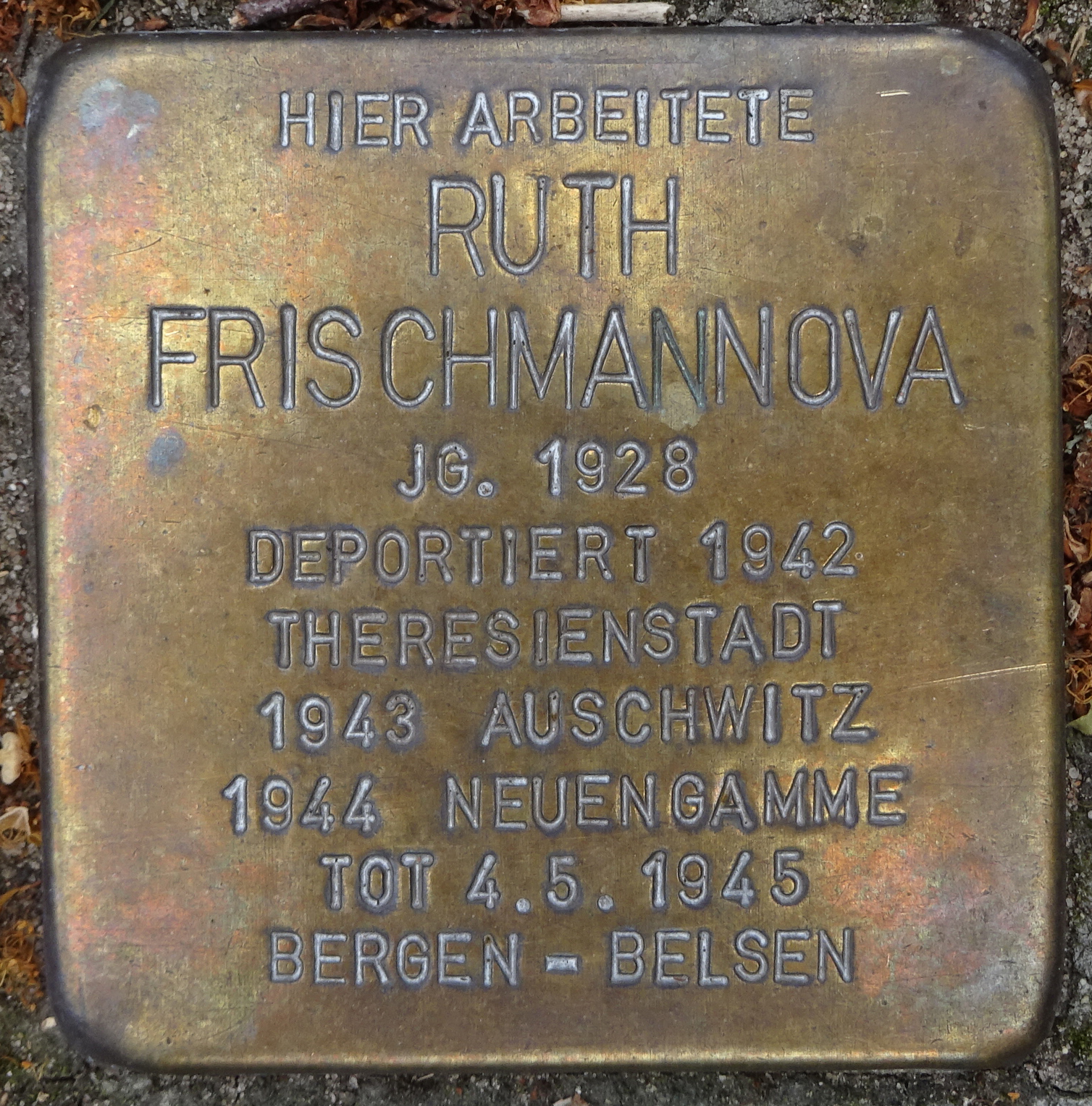 Stolperstein für Ruth Frischmannova